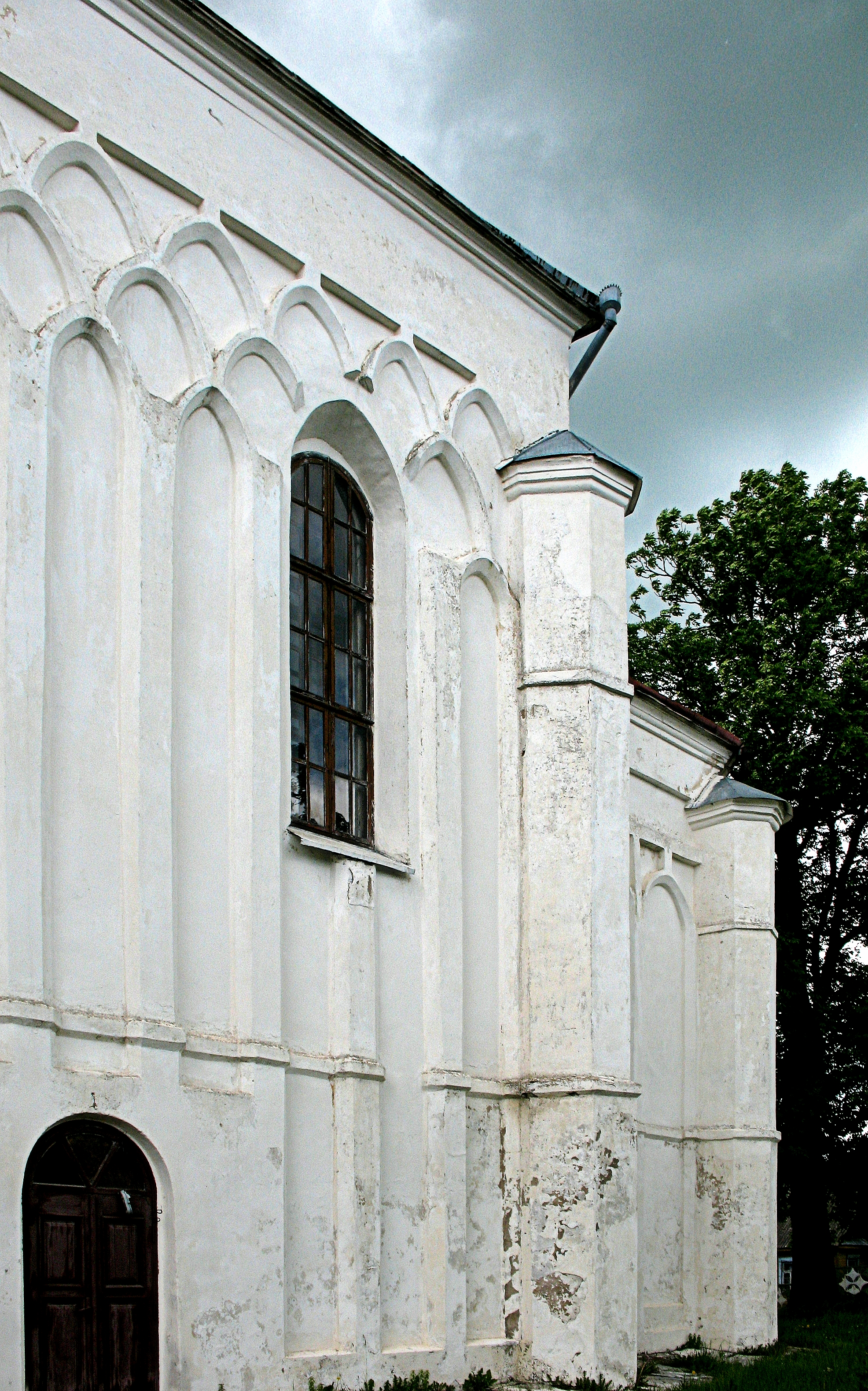 Беларуская (тарашкевіца): Комплекс Барысаглебскага кляштару:Барысаглебская царквагалоўны алтарманастырскі корпус. Наваградак This is a photo of Belarusian heritage monument. Reference number: 411Г000436 ( WLM)